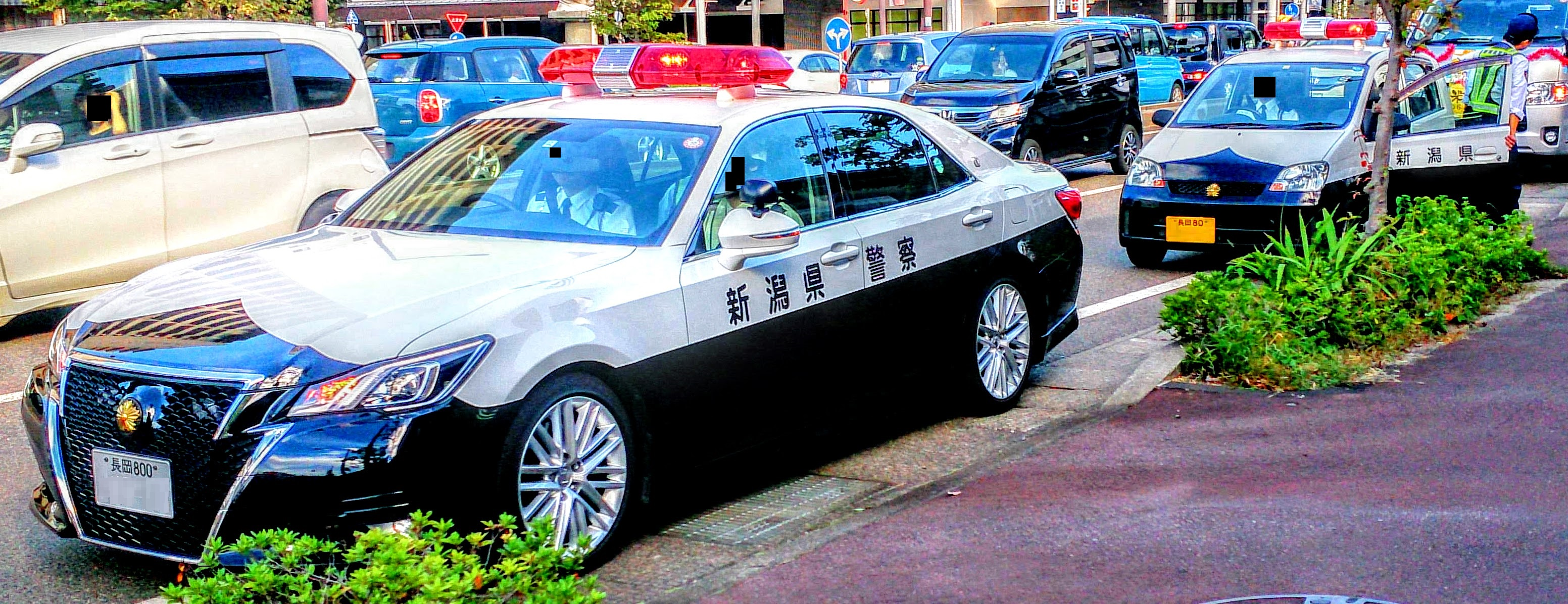 新潟県警察官 捜査車両